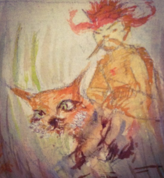 Król jadący na tygrysie, ilustracja do wiersza Ballada o trzech królach, 1942 (ze zbioru Rps. II 7994/1).